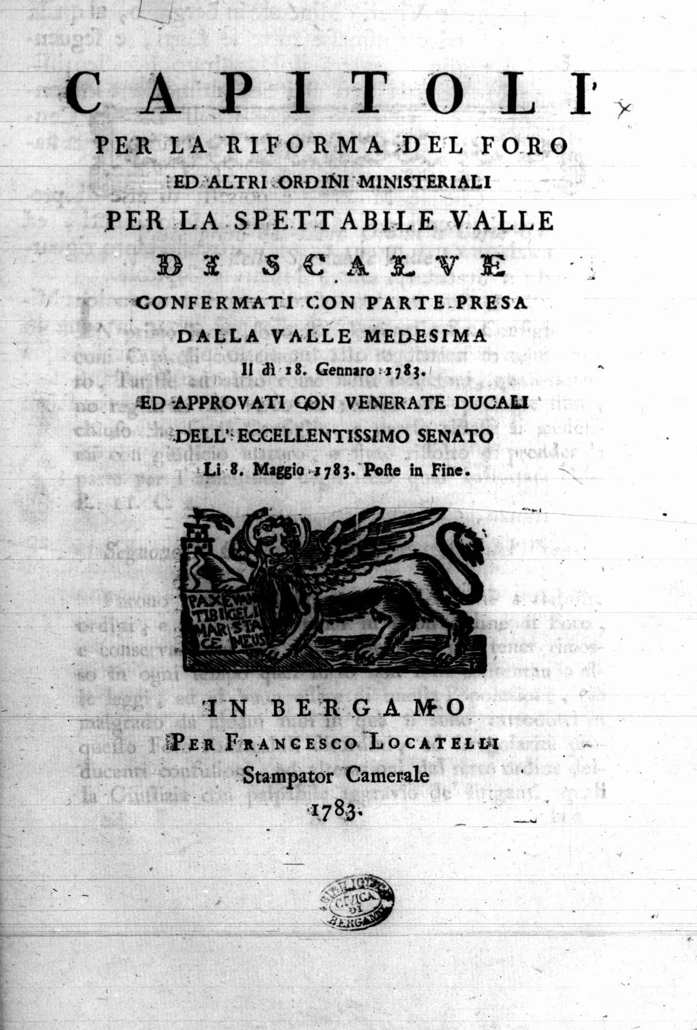 Frontespizio